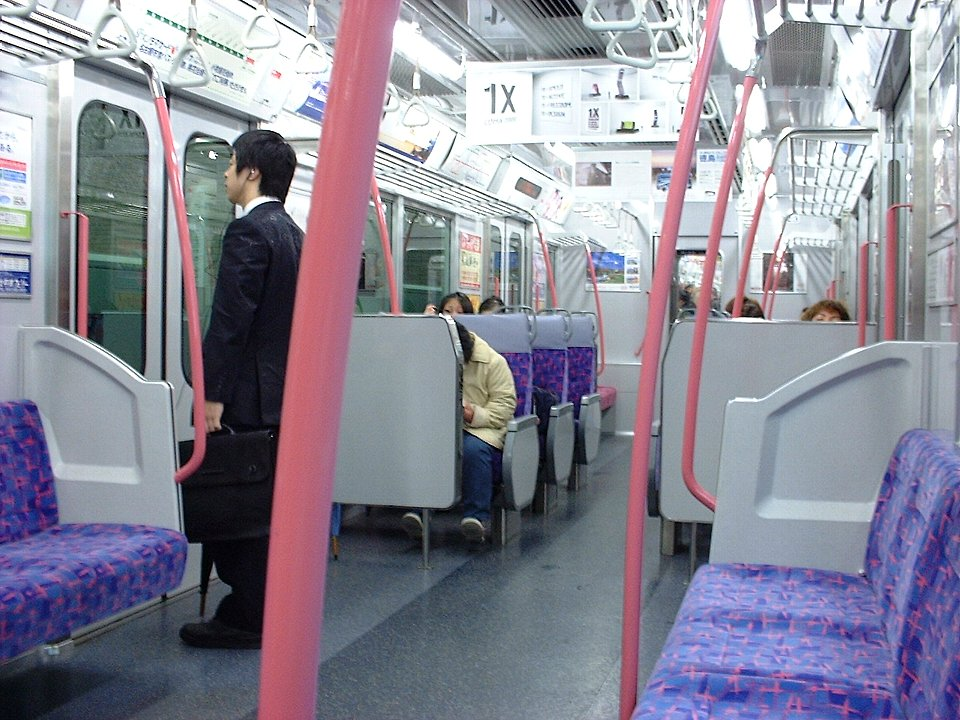 名鉄300系電車 車内 ロングシート側から